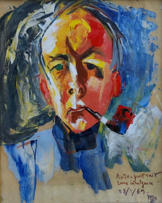 Autoportrait sans indulgence par le peintre français Guy de Montlaur.